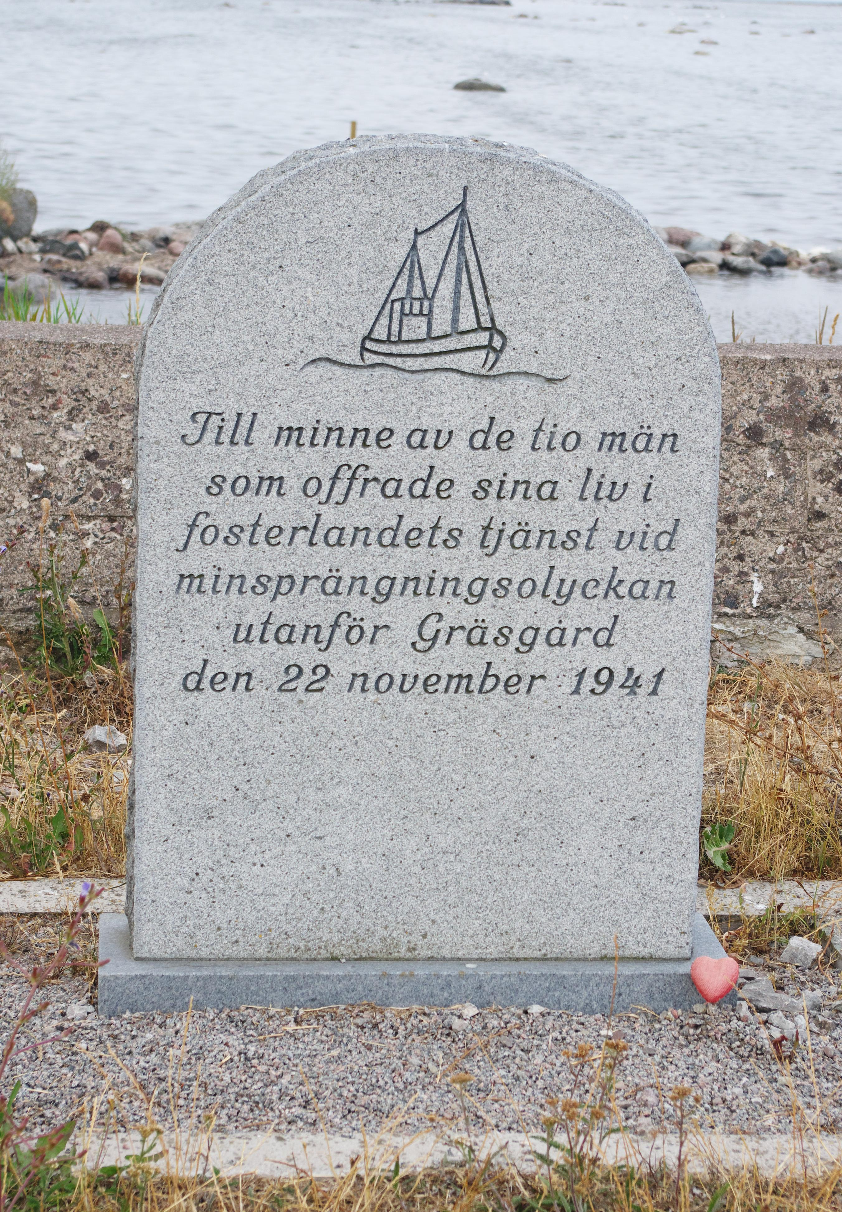 Minnessten över minsprängningen av Hjälpvedettbåten 282 Libanon rest i Gräsgårds fiskehamn i Mörbylånga kommun på södra Öland i Sverige den 22 november 2011. Elva personer befann sig på Libanon när en mina utlöstes av misstag vid upptagning av svenska minor 22 november 1941. De omkomna var: Konstituerande fänriken i flottans reserv Ernst Arne Holger Radner hemmahörande i Lund. Löjtnanten i flottans reserv Karl-Erik Fagerlund hemmahörande i Kalmar. Värnpliktige flaggkorpralen Erik Gustav Patrik Nilsson hemmahörande i Helsingborg. Furiren Allan Fingal Lundgren hemmahörande i Karlskrona. Korpralen Jon Helge Andersson hemmahörande i Karlskrona. Furiren Karl Gustav Zerny Hansson hemmahörande i Kristianstad. Värnpliktige Gustav Harald Danielsson hemmahörande i Ljungbyholm. Värnpliktige Karl Manfred Frank hemmahörande i Oskarshamn. Värnpliktige furiren Einar Svensson hemmahörande i Ekeryd. Värnpliktige Ludvig Vilhelm Karlsson hemmahörande i Fiskebäckskil.